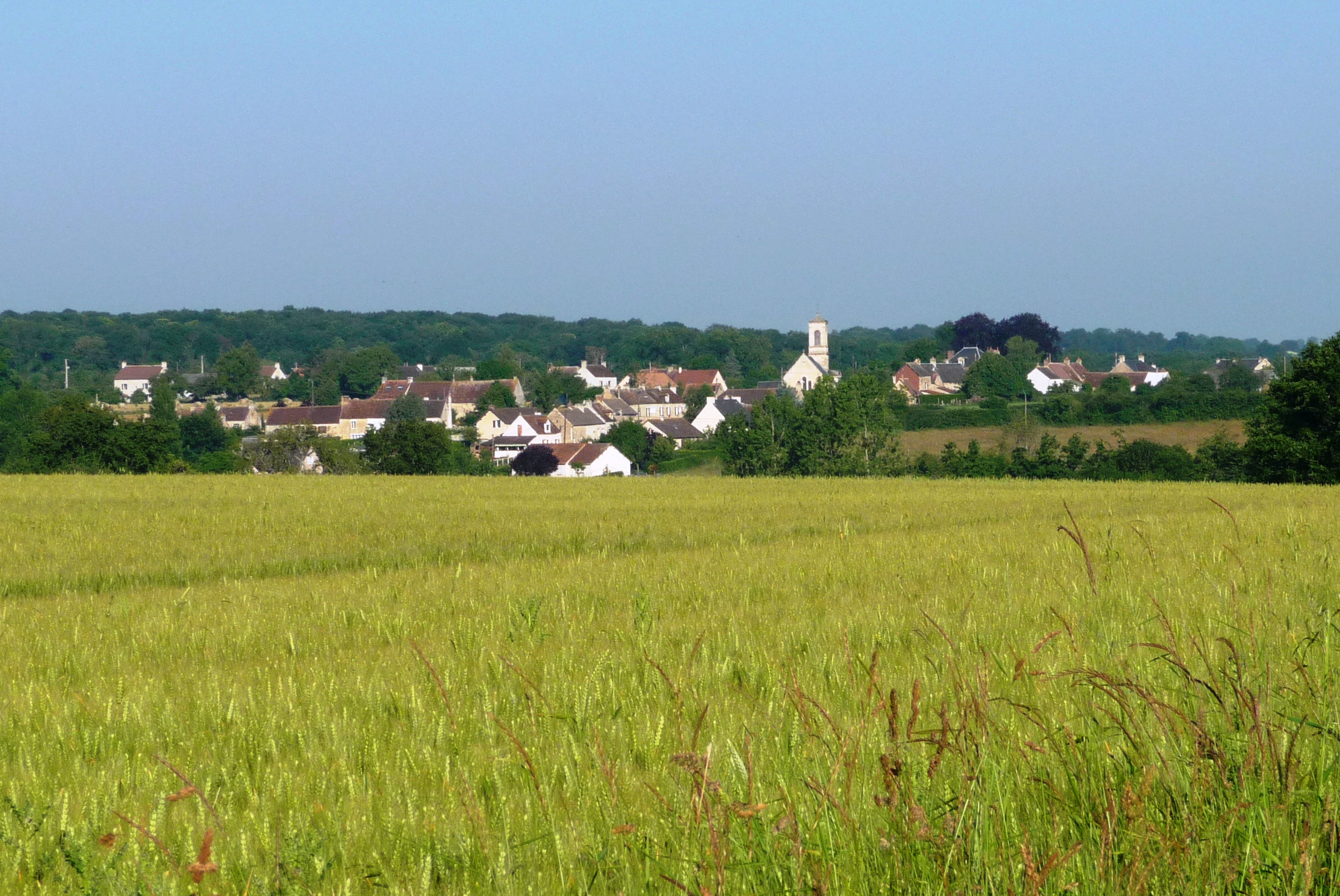 bourg de la commune de La Hoguette (14)